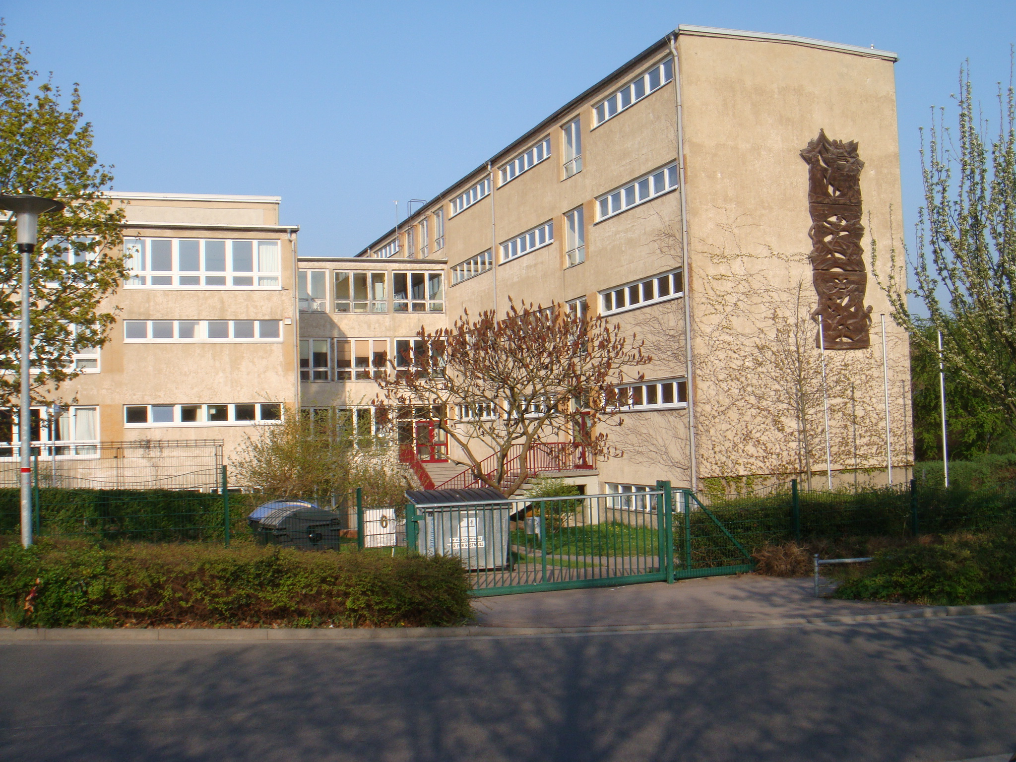 Werner-Seelenbinder-Schule